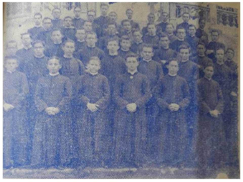 Tiempo de seminario de Monseñor Rojas Chaparro, II Obispo de Trujillo.